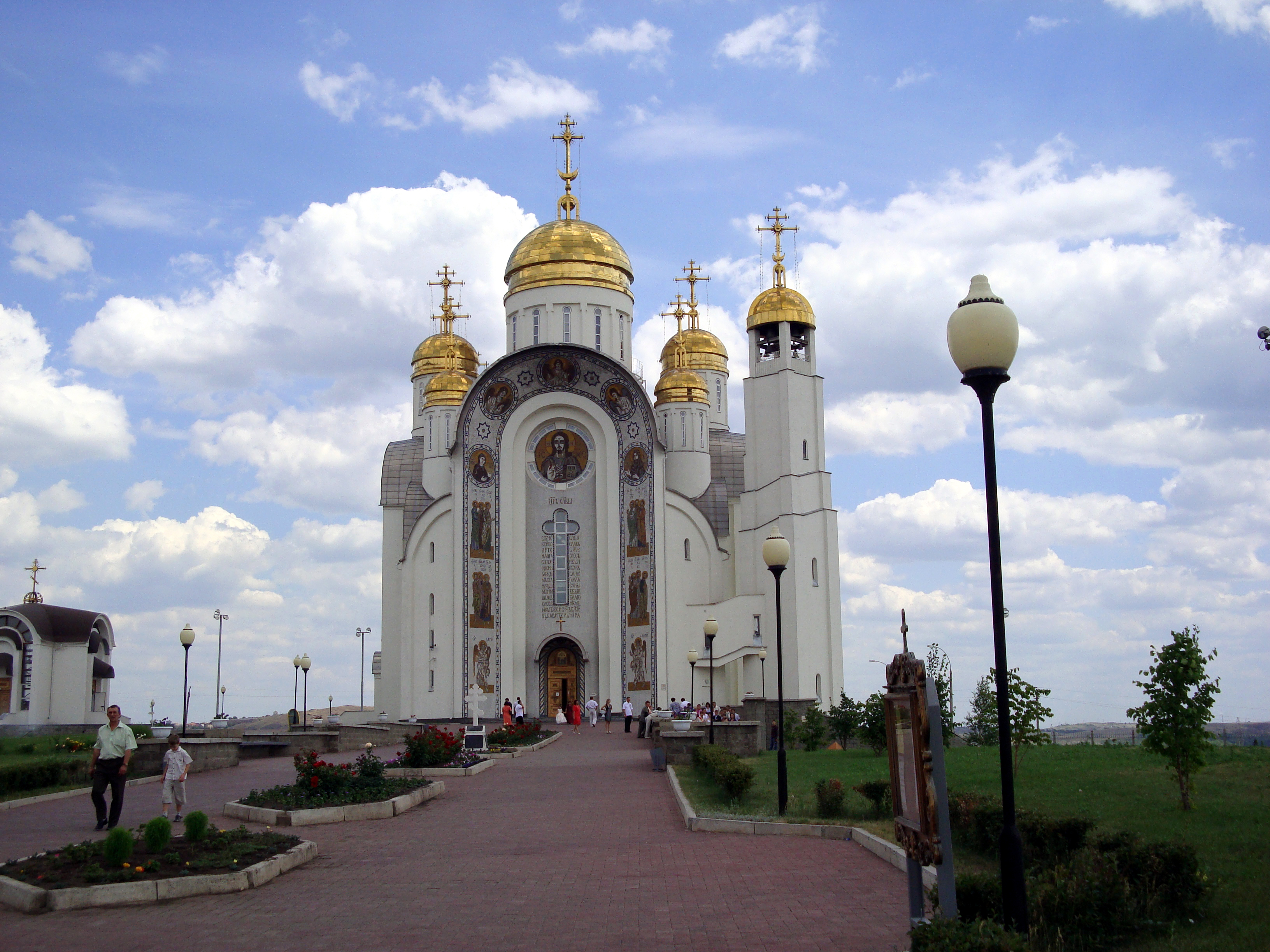 Храм Вознесения Господня (Магнитогорск)